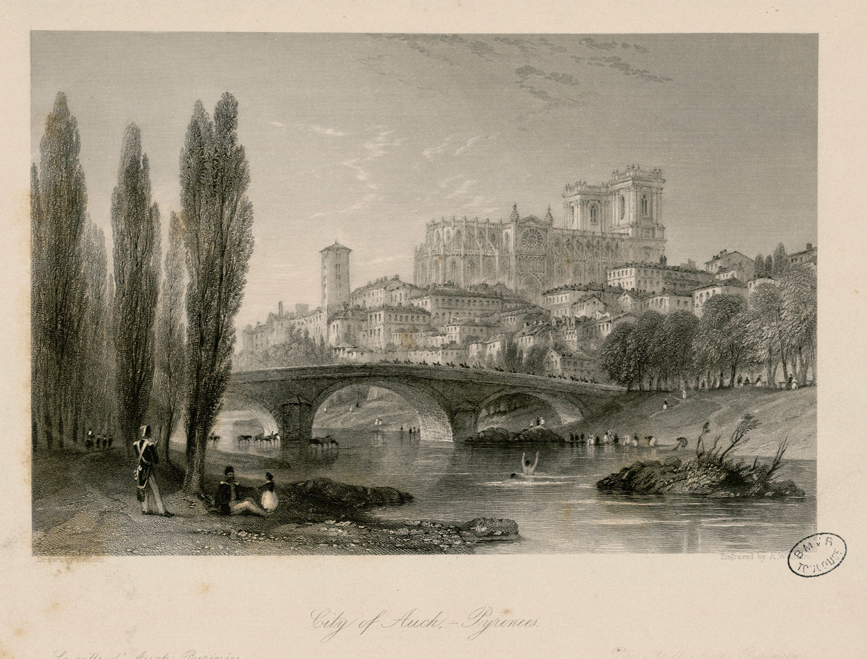 Extrait des trois volumes de "La France au XIXe siècle" de Thomas Allom, qui contient 19 planches concernant les Pyrénées (pl. 45, 49, 55, 62, 68, 75, 78, 80, 81, 83 (Tome II) et 5, 7, 16, 37, 42, 45, 65, 83, 85 (Tome III). Dans chaque tome le faux titre est gravé sur acier et rédigé en anglais. Les planches pyrénéennes ont souvent été réunies en albums, sans texte. Cet exemplaire réunit 22 gravures sur acier en noir et blanc concernant les Pyrénées et Toulouse. - Planches séparées Gravures exécutées par A. Willmore, C. T. Dixon, E. Radclyffe, J. Kernot, W. Floyd, R. Wallis, S. Fischer, J. C. Bentley, H. Adlard, Augs. Fox, J. Templeton, S. Bradshaw, J. Tingle, T. Turnbull, J. Carter, d'après les dessins de T. Allom Ancely, René (1876 - 1966). Possesseur